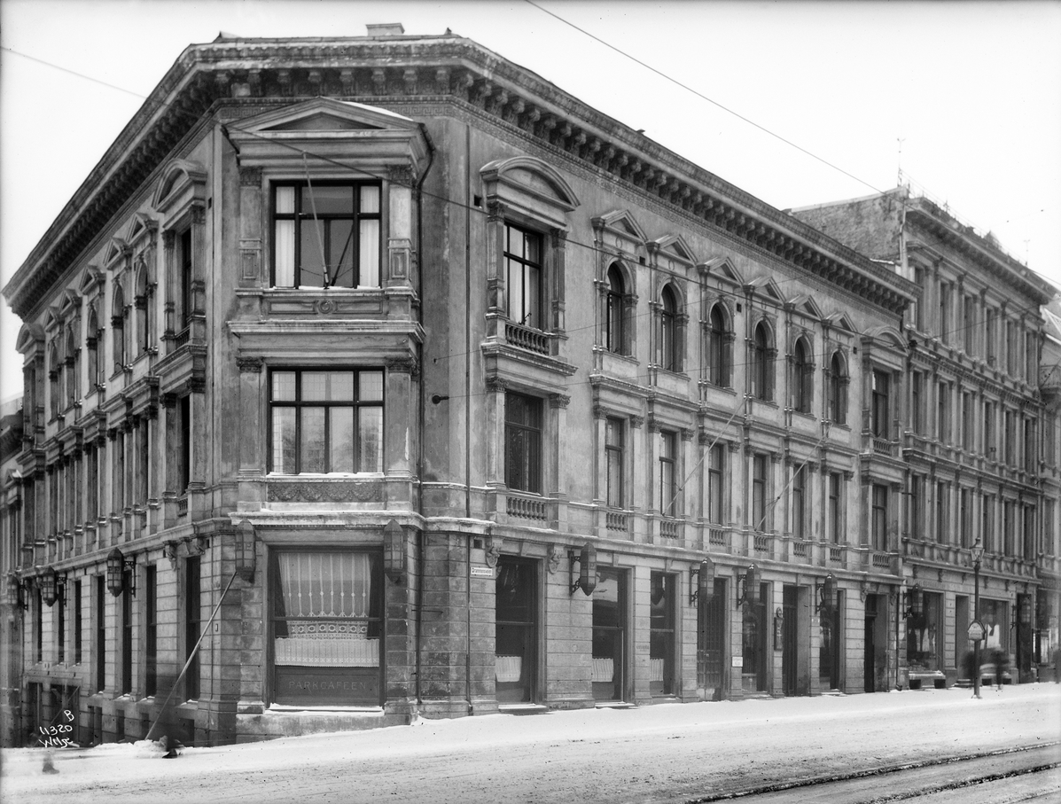 Huitfeldts gate 1 (ark. August Tidemand, 1877) inneholdt i sin tid Parkkafeen. Senere omregulert til Drammensveien 10 og deretter Henrik Ibsens gate 36. I dag holder Pascals konditori til i bygningen. Til høyre ses Drammensveien 16 (Henrik Ibsens gate 40–42).